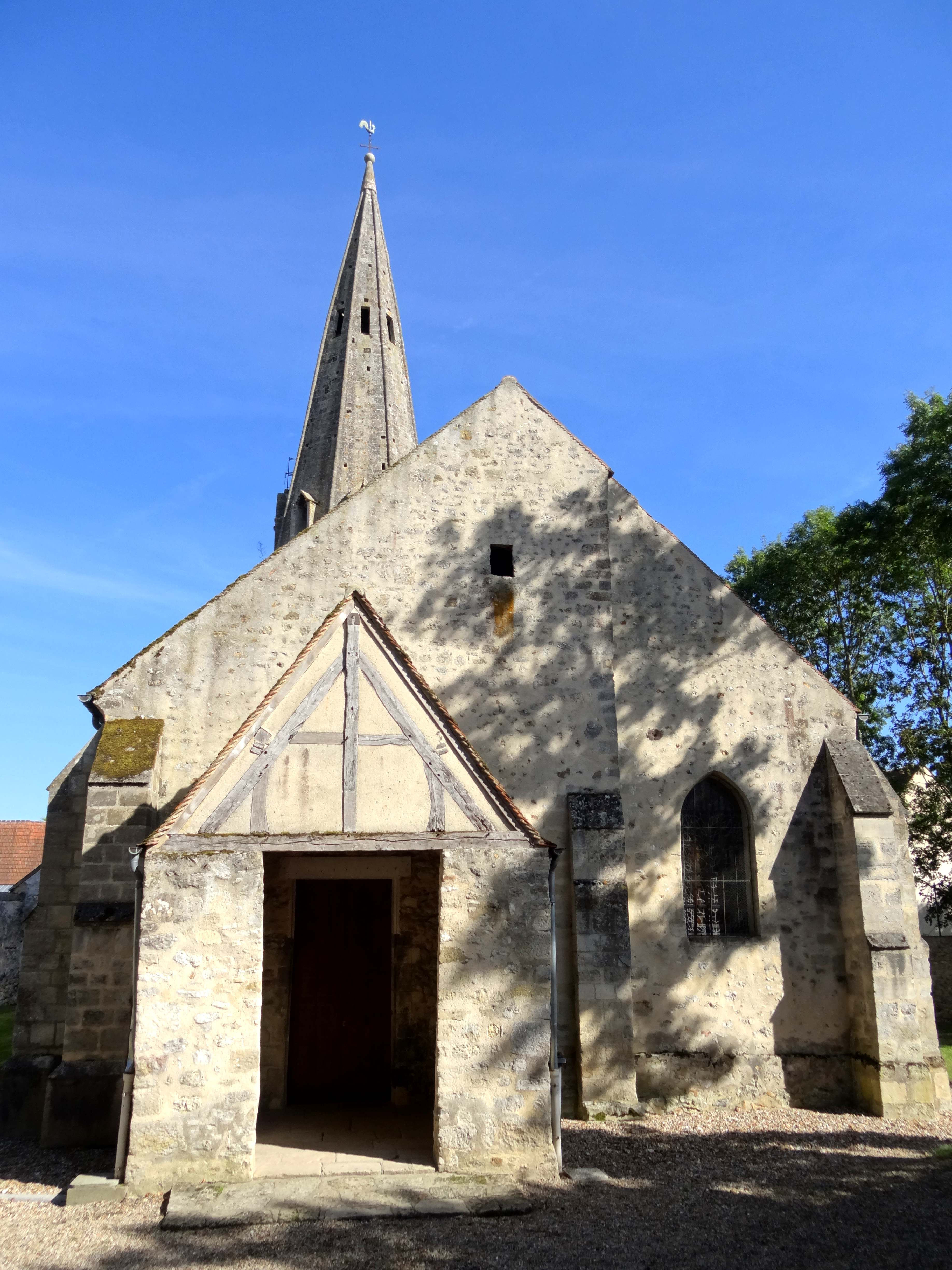 Église Notre-Dame de Jambville - voir titre.